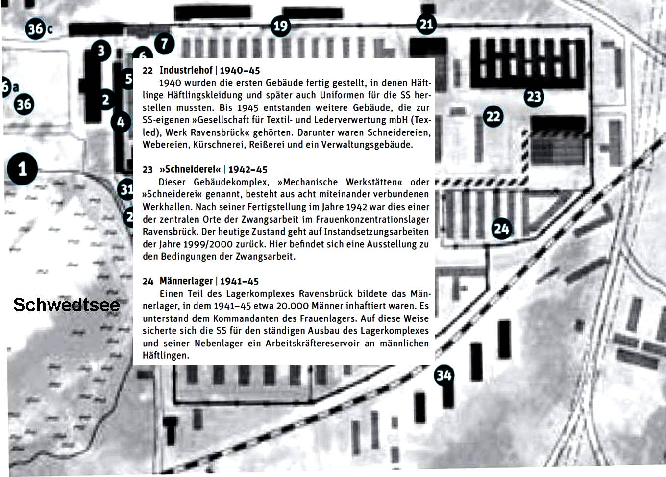 KZ Ravensbrück, Auuschnitt Texled